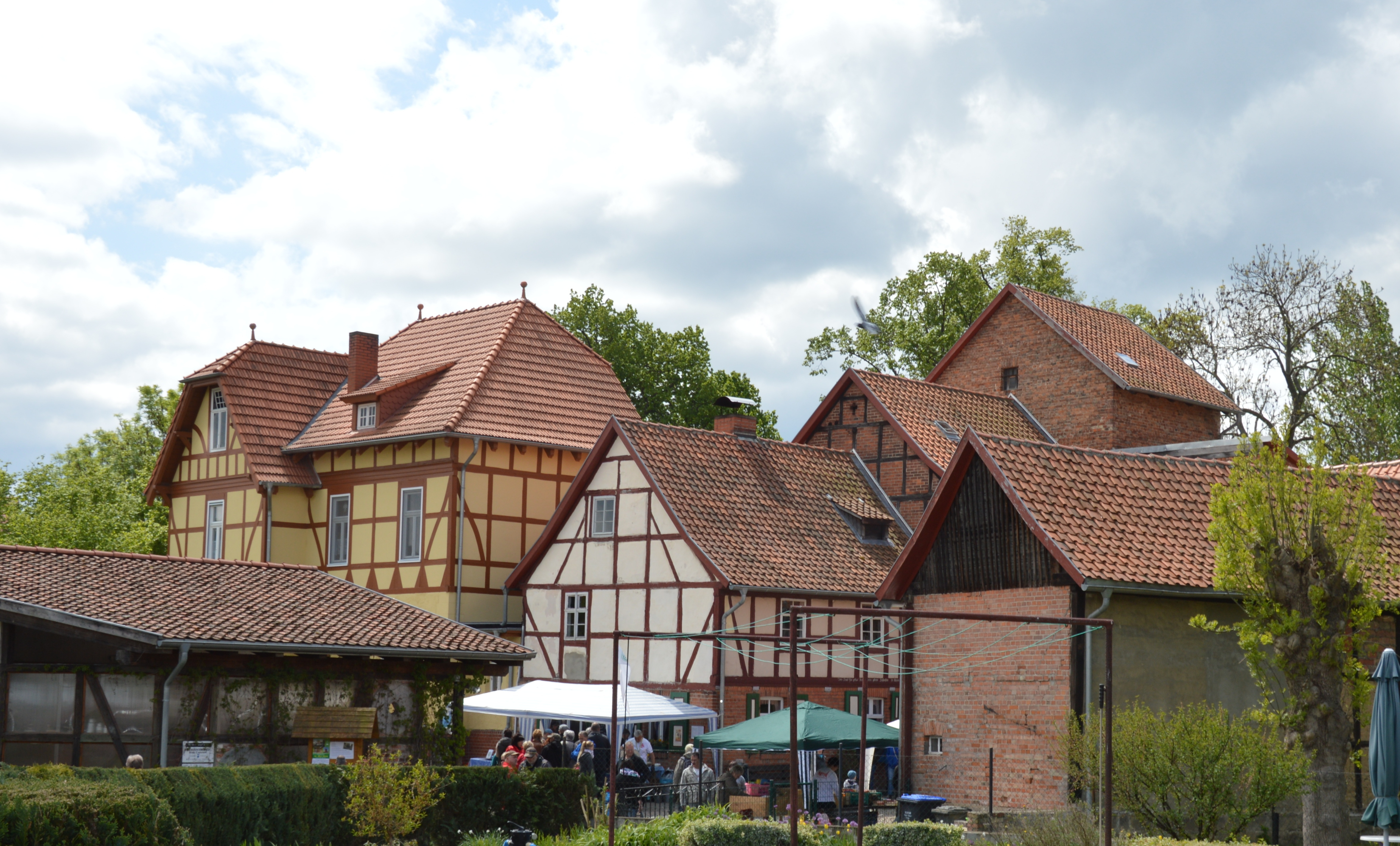 Mühle Klein Quenstedt